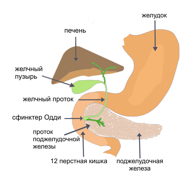 Желчь. Поджелудочная железа. Желудок